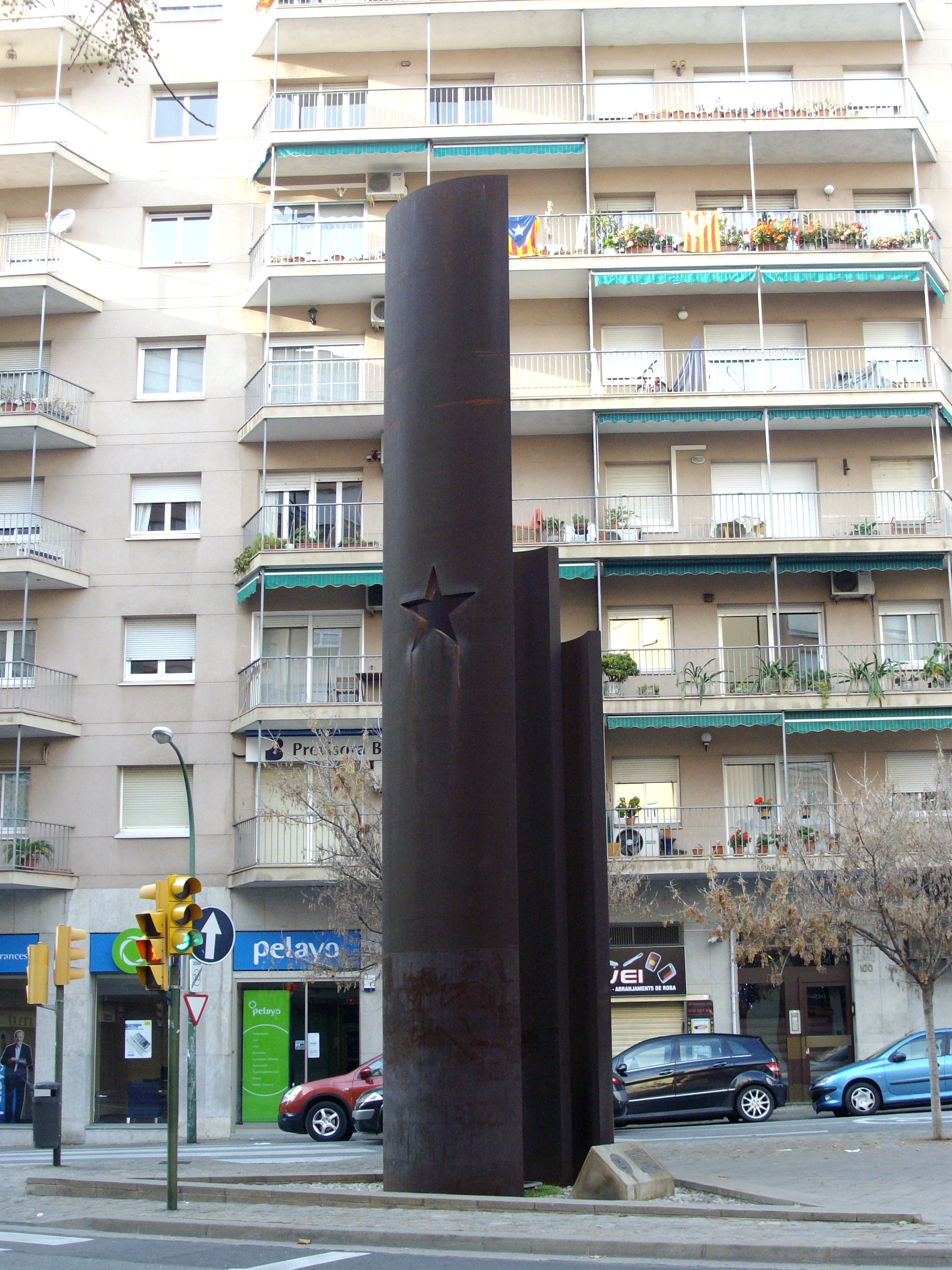 Monumento a L.L. Zamenhof, creador del idioma esperanto, erigido en 1989 en la ronda Zamenhof, en Sabadell, Barcelona (España).